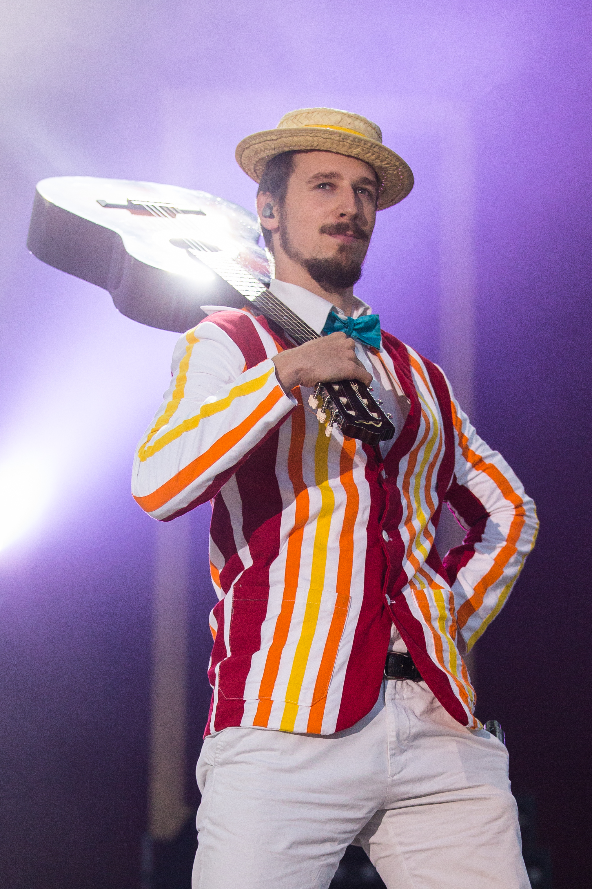 Rock'n'Heim Rock Festival Hockenheim August 2014